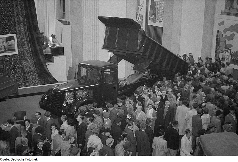 Original image description from the Deutsche Fotothek LKW im sowjetischen Pavillon der Leipziger Herbstmesse 1954